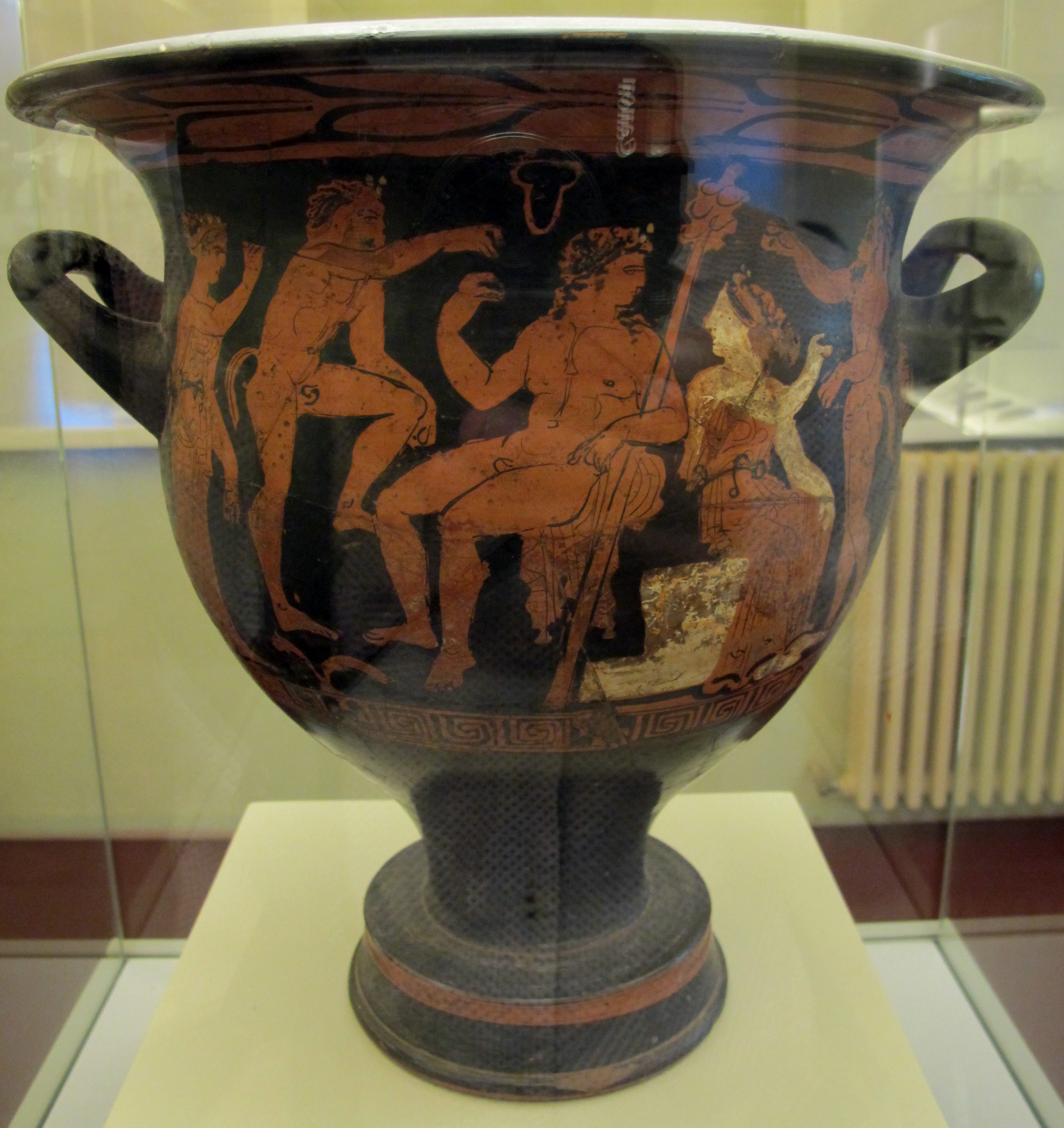 Montopoli val d'Arno, museo di palazzo guicciardini, cratere attico a figure rosse, da Populonia, 390 ac. ca.